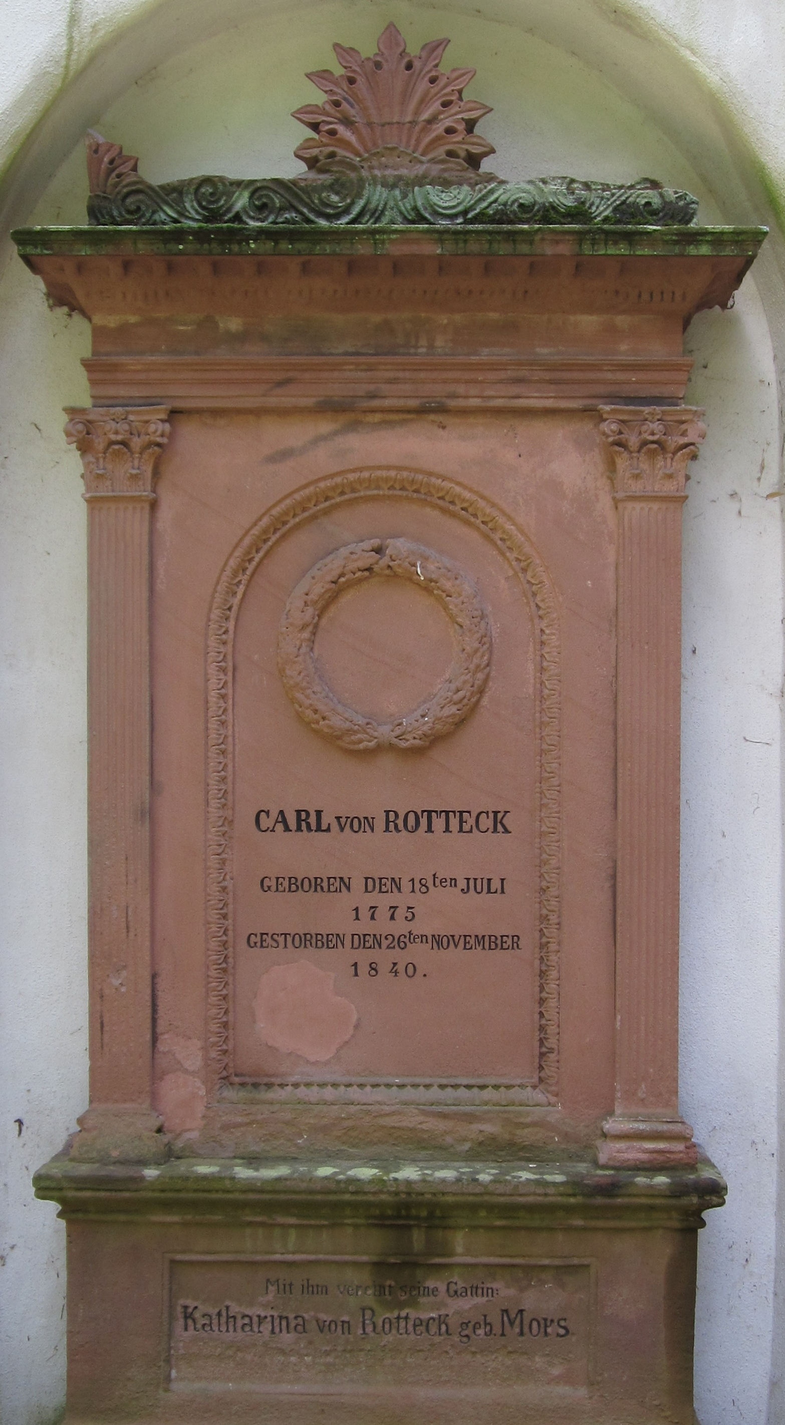 Alter Friedhof (Freiburg)